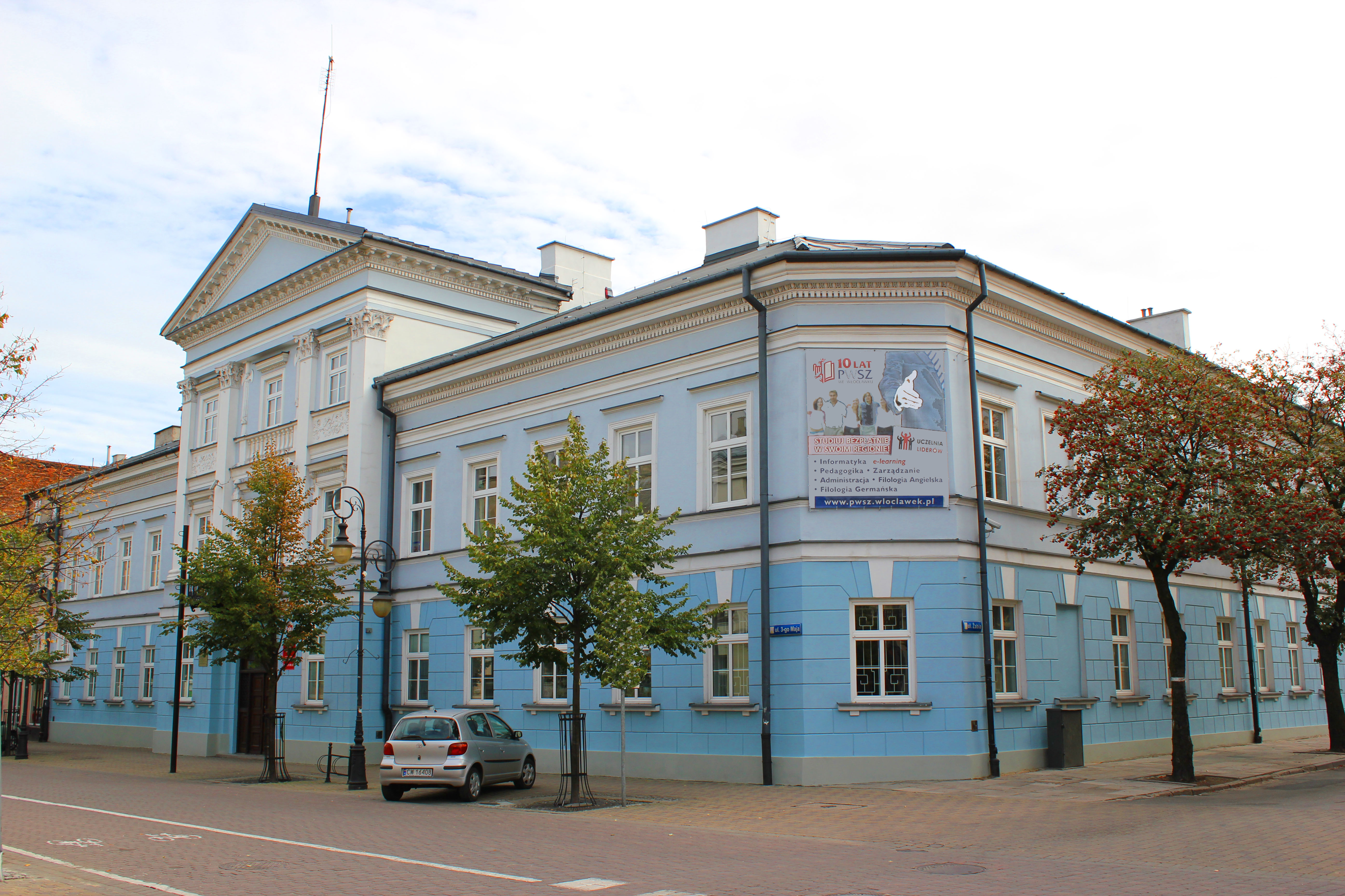 starostwo, 1836-1844, 1851 Włocławek, ul. 3 Maja 17, miasto Włocławek